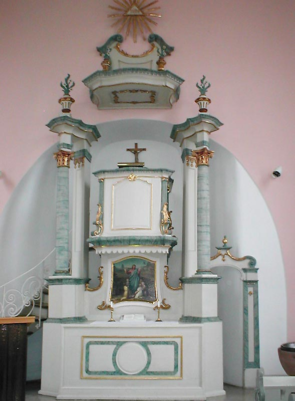 Altar der evang. Kirche in Aglasterhausen-Daudenzell. Ungewöhnlich für diese Region ist die in den Altar integrierte Kanzel sowie die Durchlasstür rechts, durch die man in die Turmkapelle gelangt.